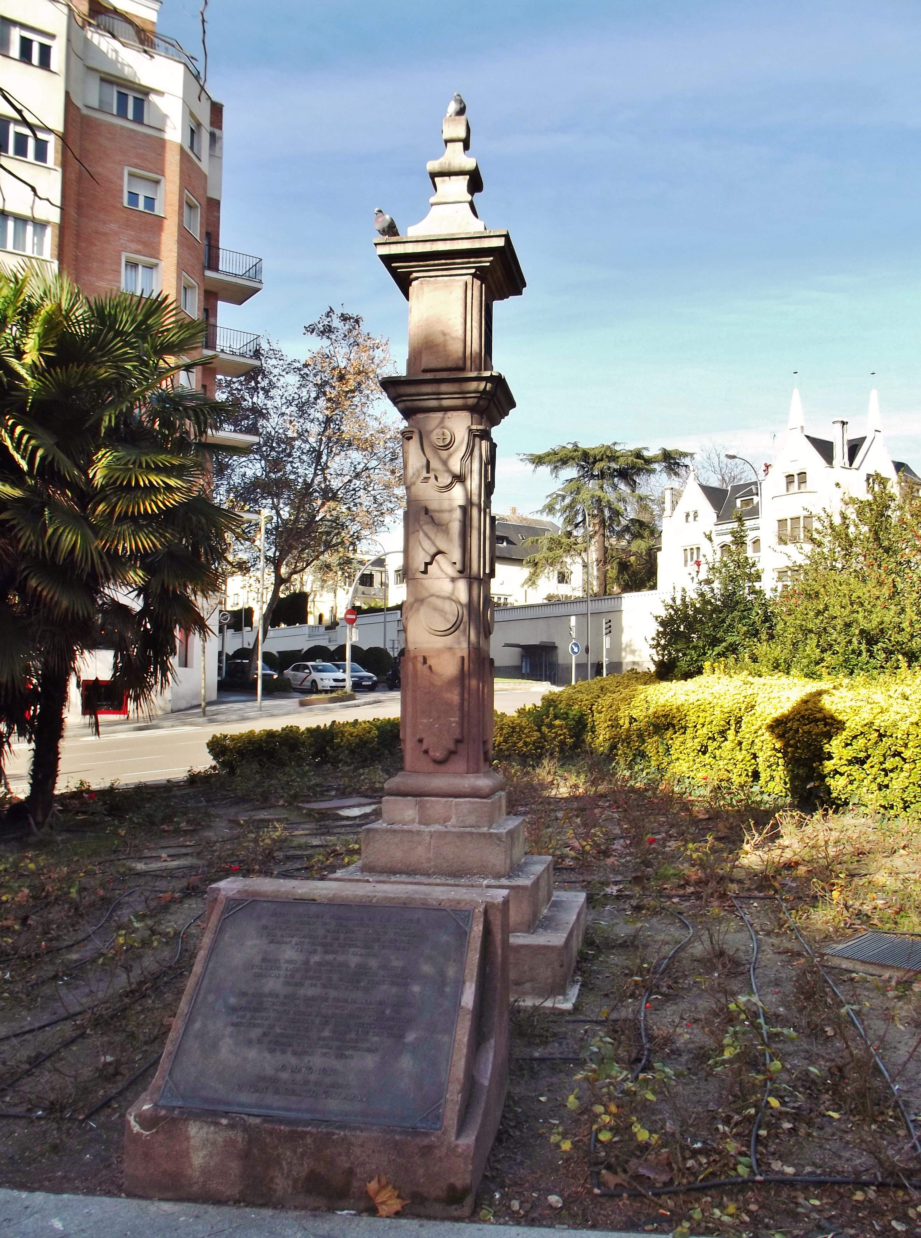 Pairón en la calle de María de Molina, Madrid.